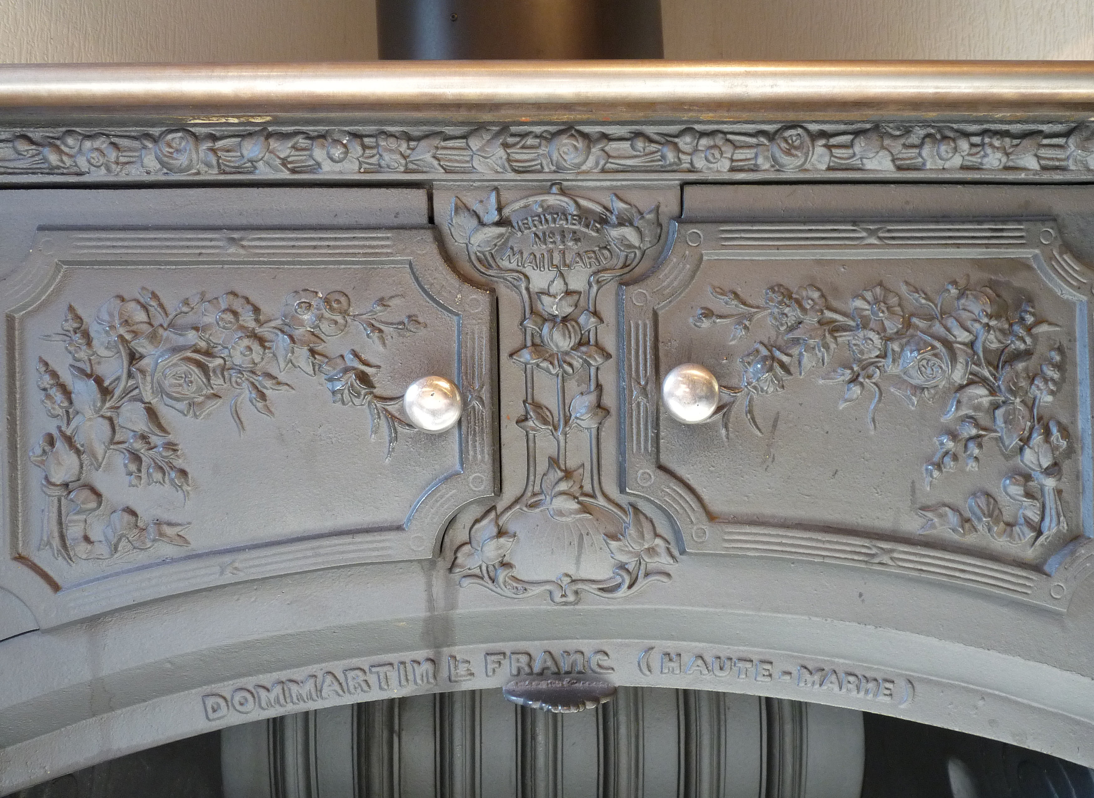 Fonte d'art à Dommartin-le-Franc (Haute-Marne). Cheminée-cuisinière Maillard (détail)